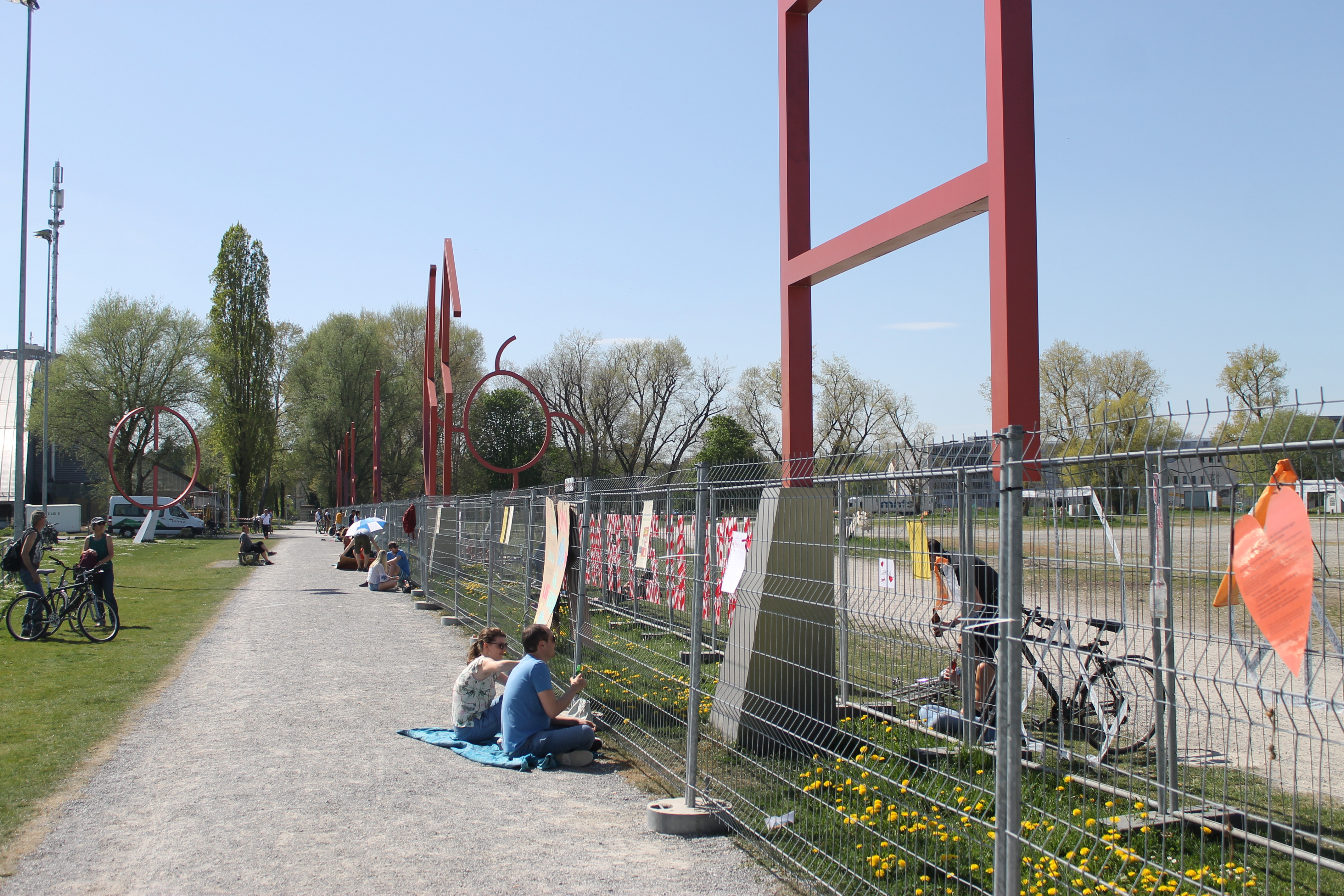 Abgesicherte Kunstgrenze. Der Zaun wurde zuerst von der Deutschen Bundespolizei errichtet. Ein Schweizer Zaun folgte später.